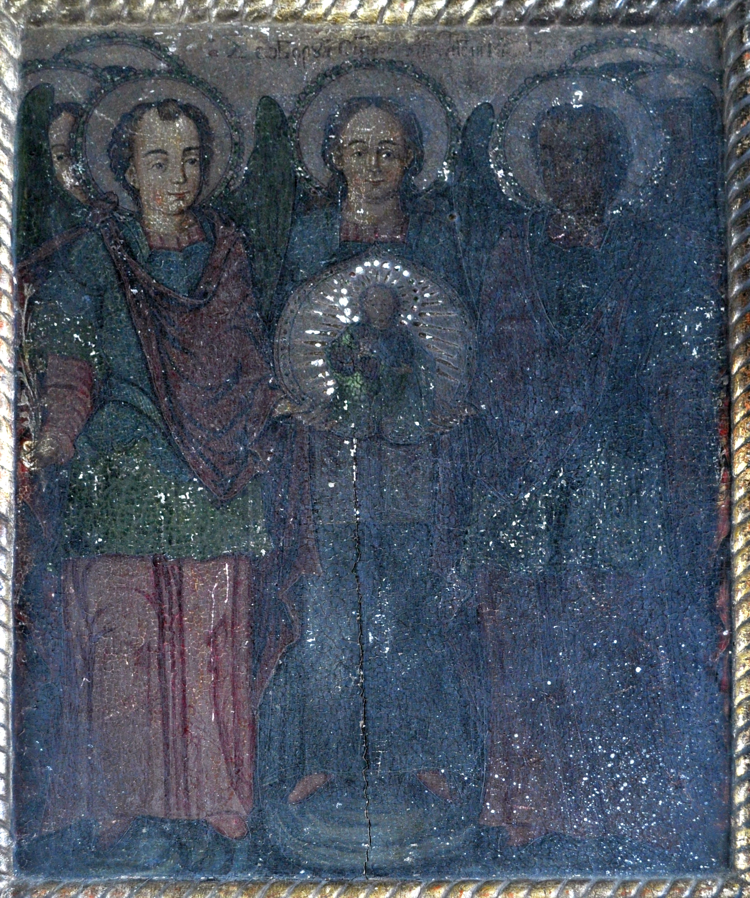 Biserica din Mănăstireni, județul Cluj (icoanele de patrimoniu)